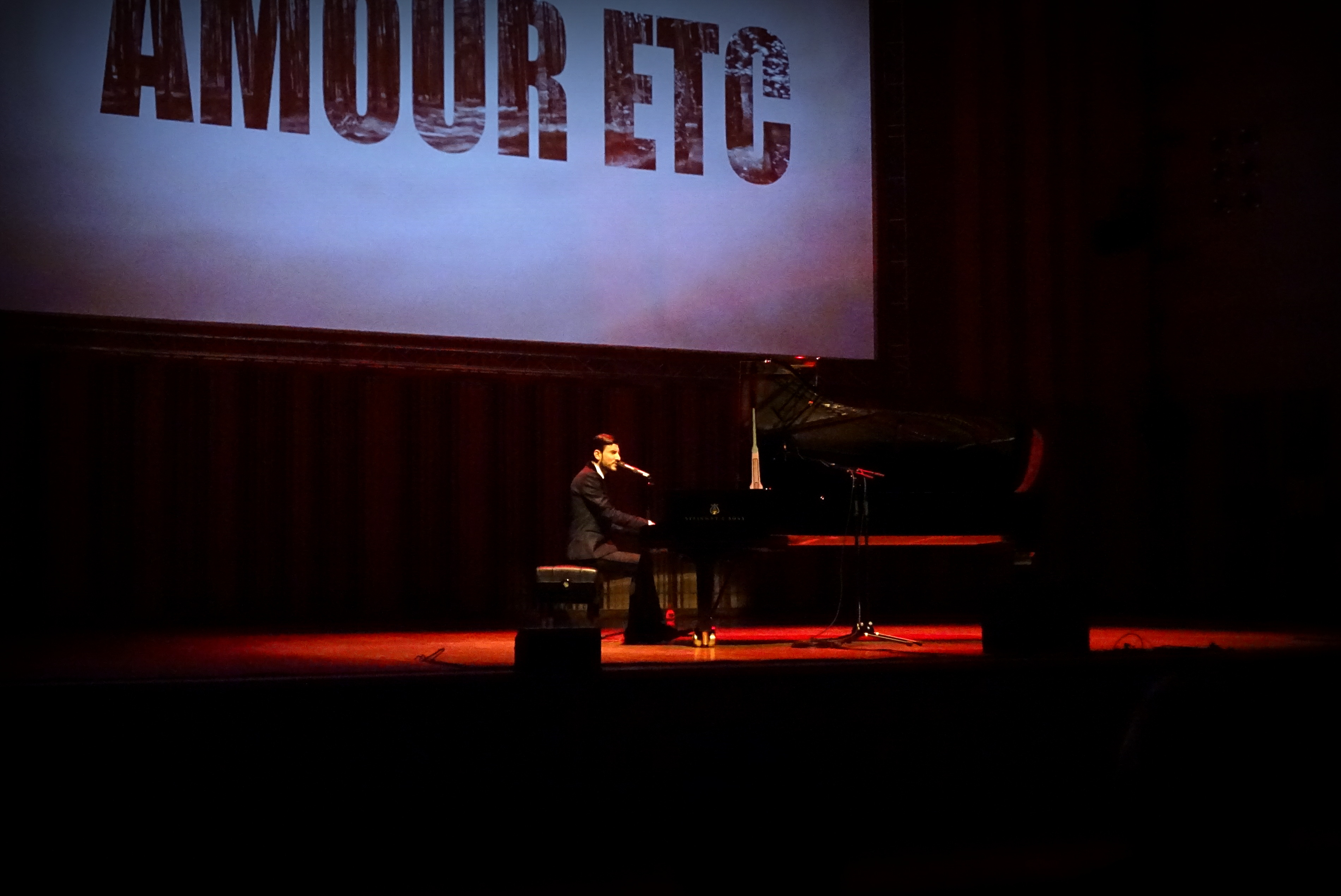 Koncert Michała Kwiatkowskiego w Filharmonii Gorzowskiej